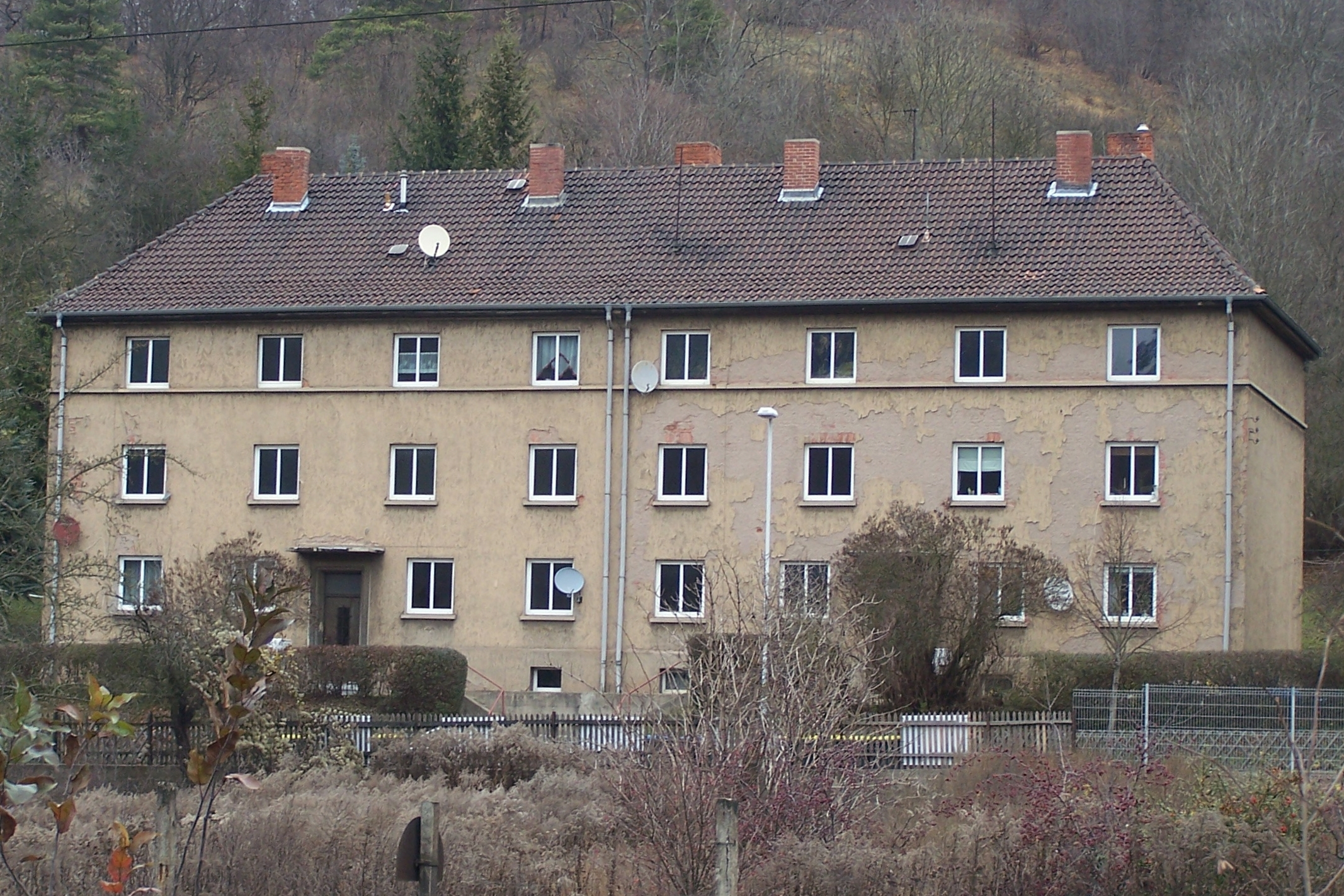 Gesamtansicht von Süden.